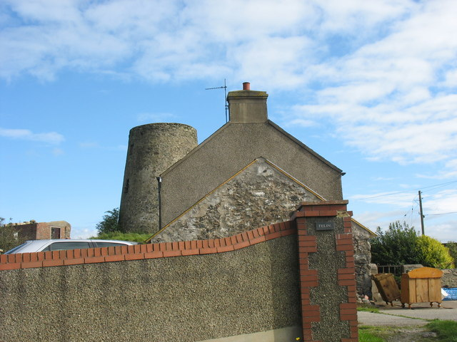 Y Felin and the ruined Melin Gwalchmai, Gwalchmai, Anglesey